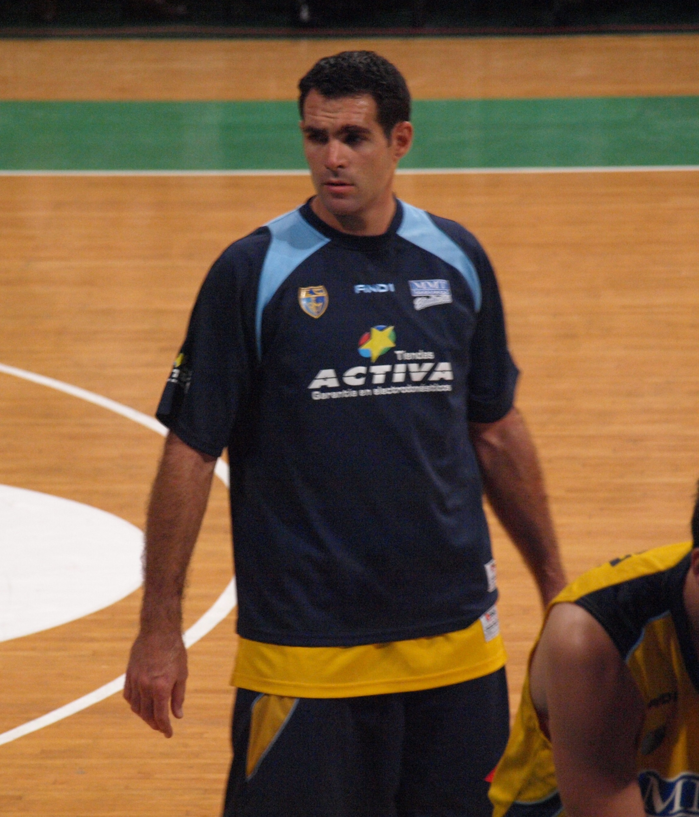 Iker Iturbe en el calentamiento previo al partido de la segunda jornada de la liga ACB 2008-09 que enfrentó al Estudiantes y al DKV Joventut en el Olímpico de Badalona.